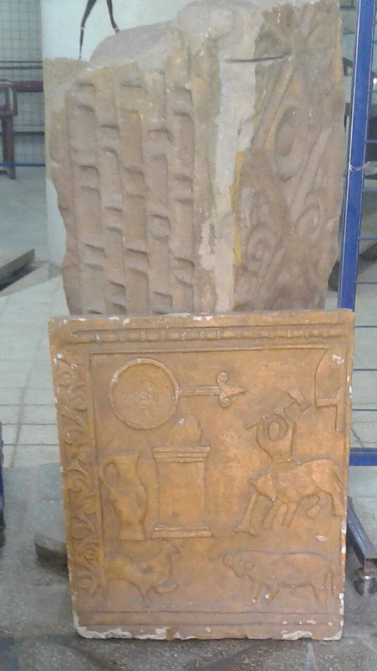 musée EL ASNAM